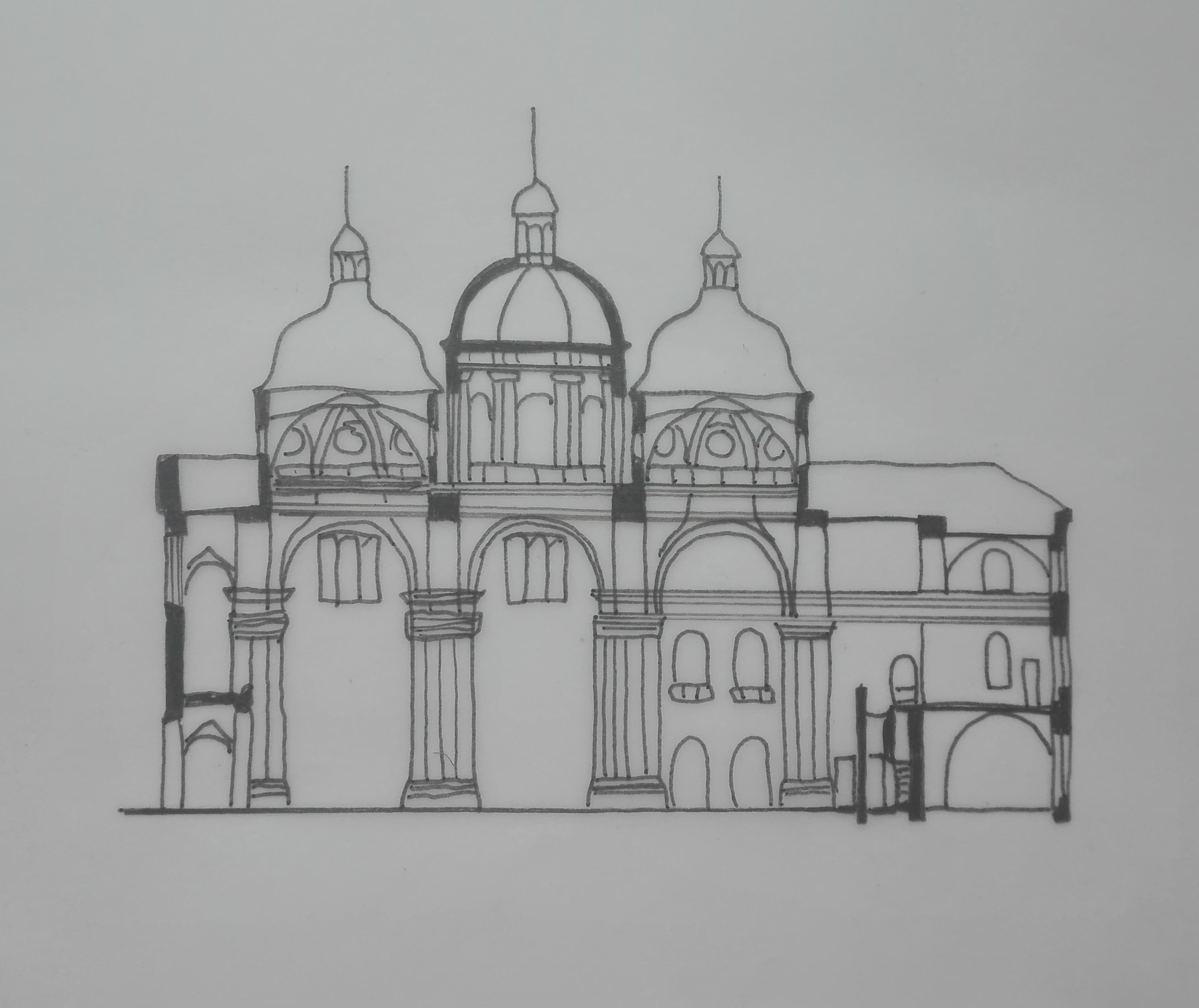 Podélný řez dominikánským kostele po barokní přestavbě